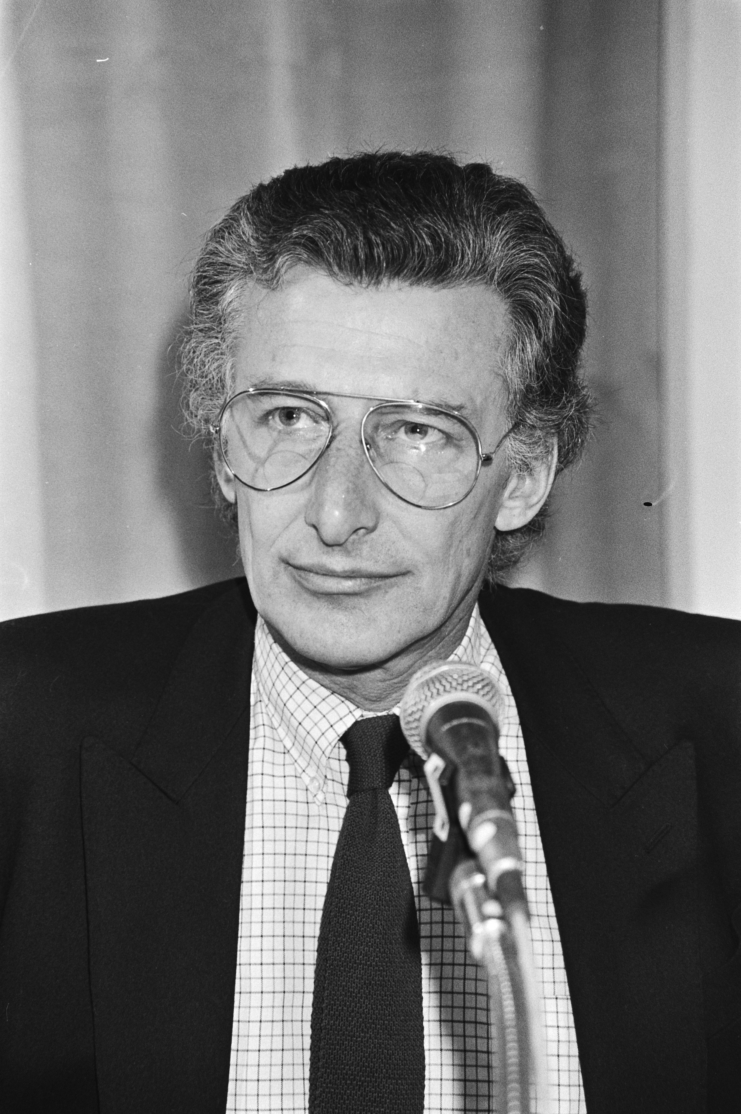 Collectie / Archief : Fotocollectie Anefo Reportage / Serie : [ onbekend ] Beschrijving : Harry Mulisch bij een politiek debat in De Populier in Amsterdam met Joop den Uyl en Hans van Mierlo Datum : 18 januari 1981 Locatie : Amsterdam, Noord-Holland Trefwoorden : affiches, debatten, microfoons, politieke partijen, portretten, schrijvers Persoonsnaam : Mulisch, Harry Fotograaf : Dijk, Hans van / Anefo, [onbekend] Auteursrechthebbende : Nationaal Archief Materiaalsoort : Negatief (zwart/wit) Nummer archiefinventaris : bekijk toegang 2.24.01.05 Bestanddeelnummer : 931-2689